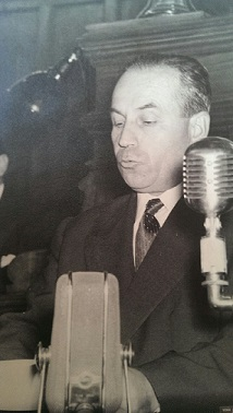 Halil Sezai Erkut'un meclis konusmasi, aile arsivinden.